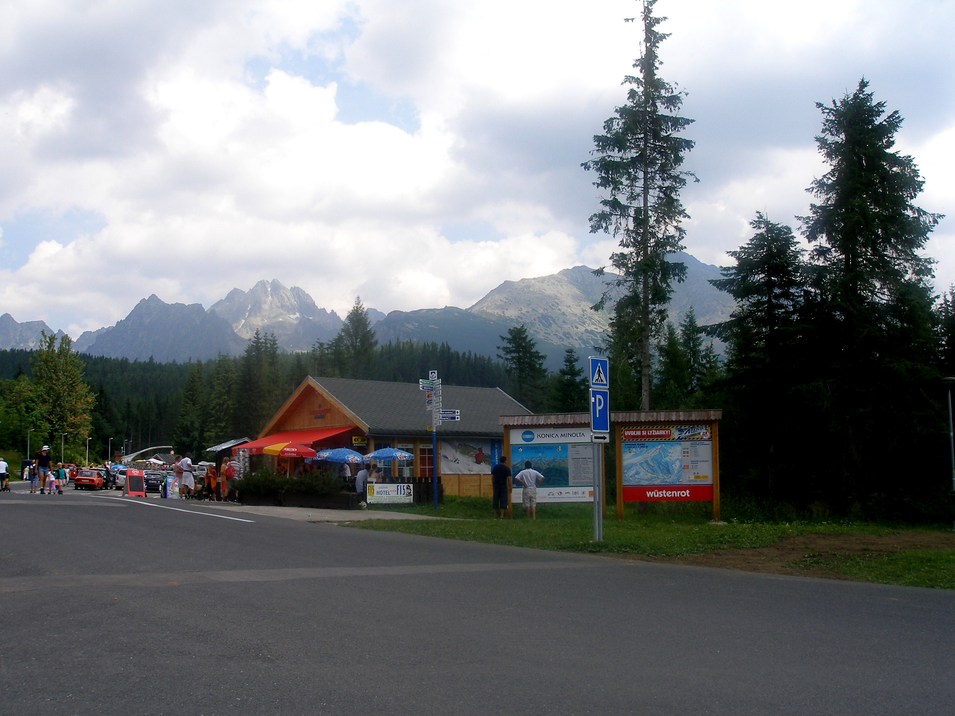 Tatranská osada Štrbské Pleso